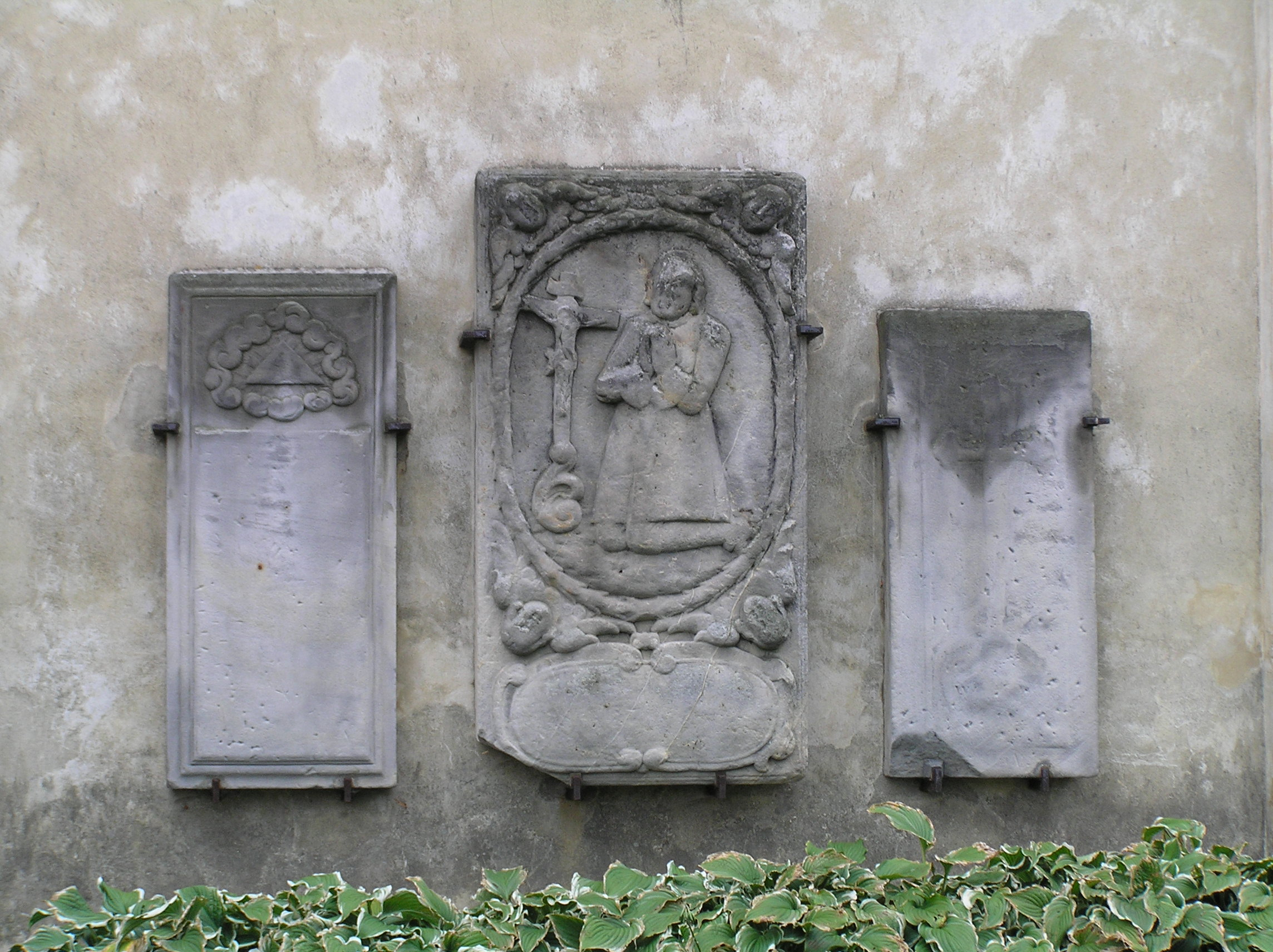 Kostel Nejsvětější Trojice, Bzí (Železný Brod).